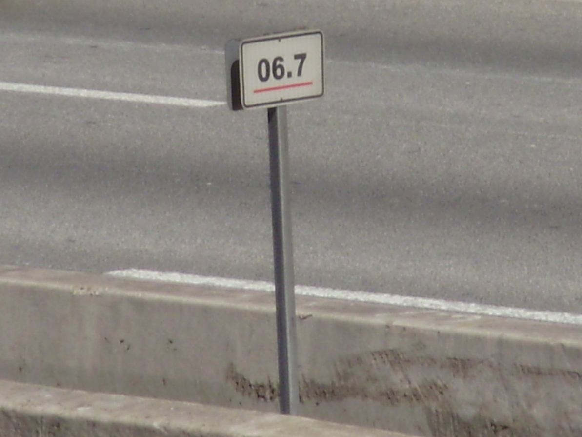 Borne située sur le terre-plein central du boulevard périphérique de Paris, en France, un peu à l'ouest du pont de l'avenue Georges-Lafenestre. Le marquage avec soulignement en rouge indique que ce point de repère est vu par les véhicules circulant sur le périphérique intérieur et qu'il est implanté à 6,7 km du point 0 situé sur le Pont amont.